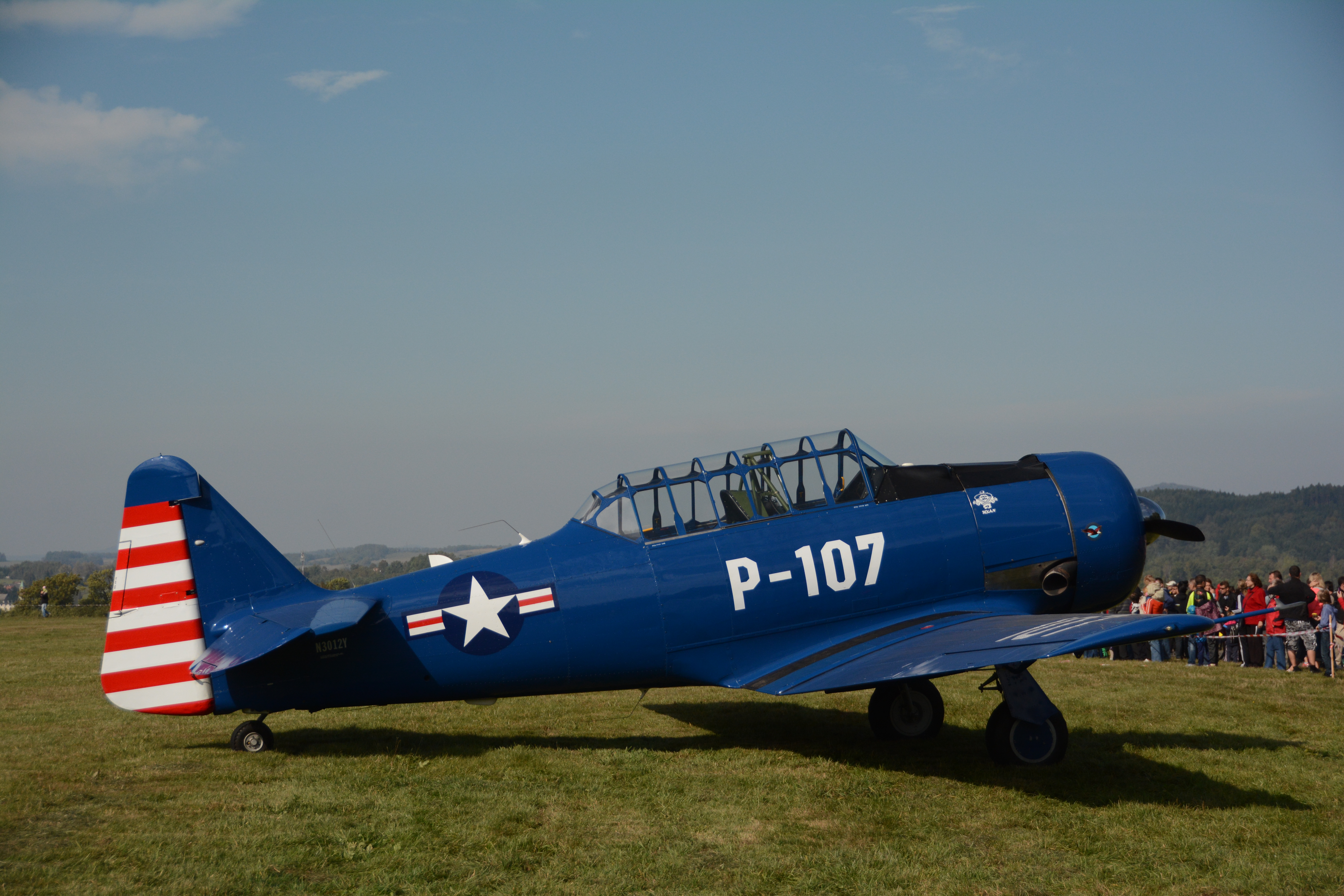 AT-6D Texan na leteckém dni v Lieberci